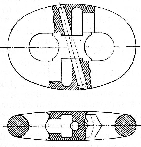 Это изображение было использовано для иллюстрирования статьи «Канат якорный (якорная цепь)» опубликованной в двенадцатом томе «Военной энциклопедии», который был издан книгоиздательским товариществом И. Д. Сытина в 1913 году в столице Российской империи городе Санкт-Петербурге.